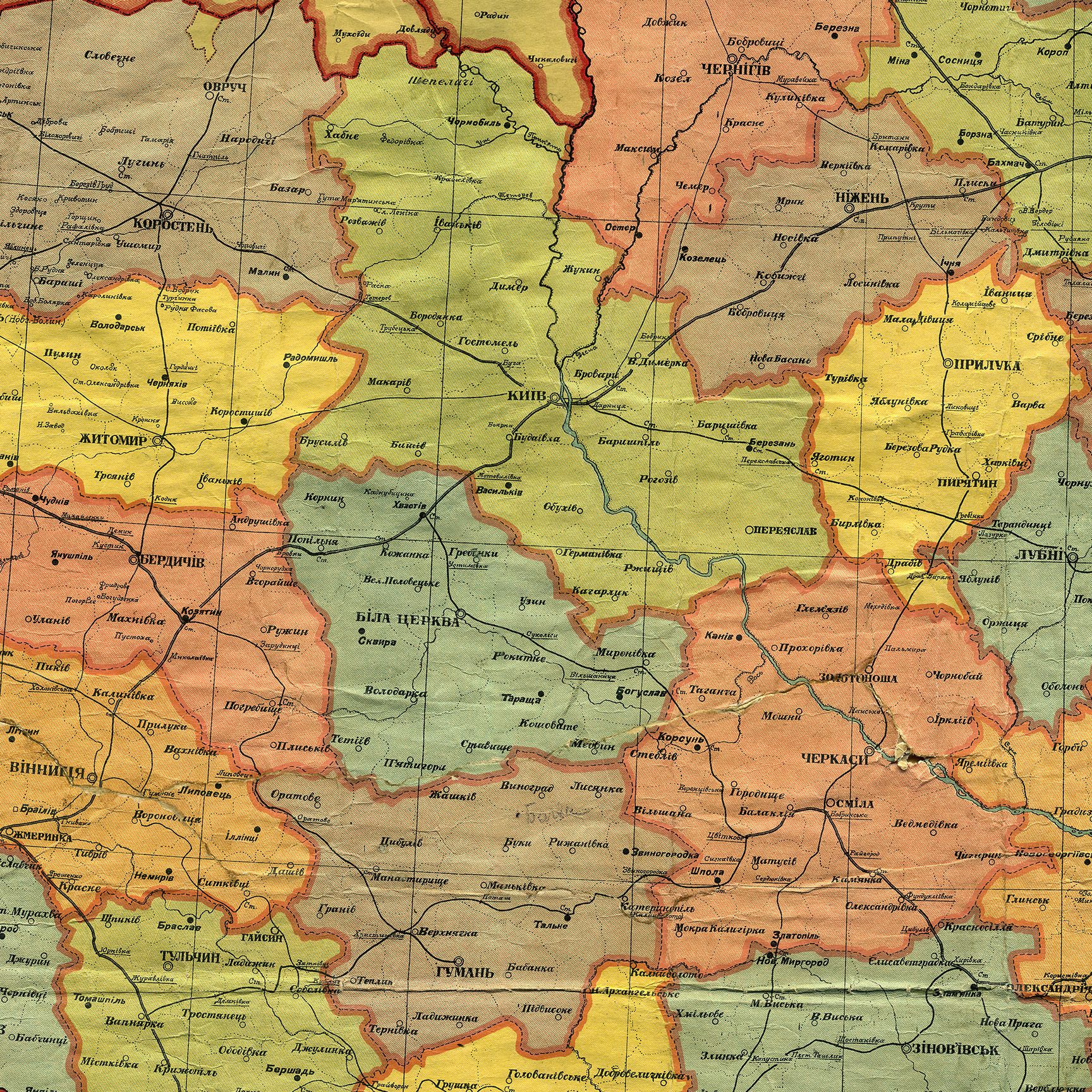 Територія колишньої Київської губернії, фрагмент мапи Української соц. рад. республіки, адміністративний поділ від 1 жовтня 1925